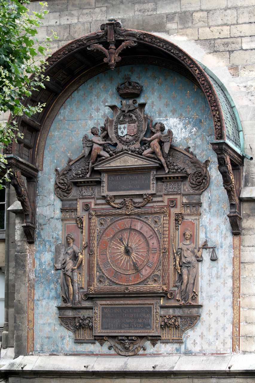 Horloge de la Conciergerie à Paris